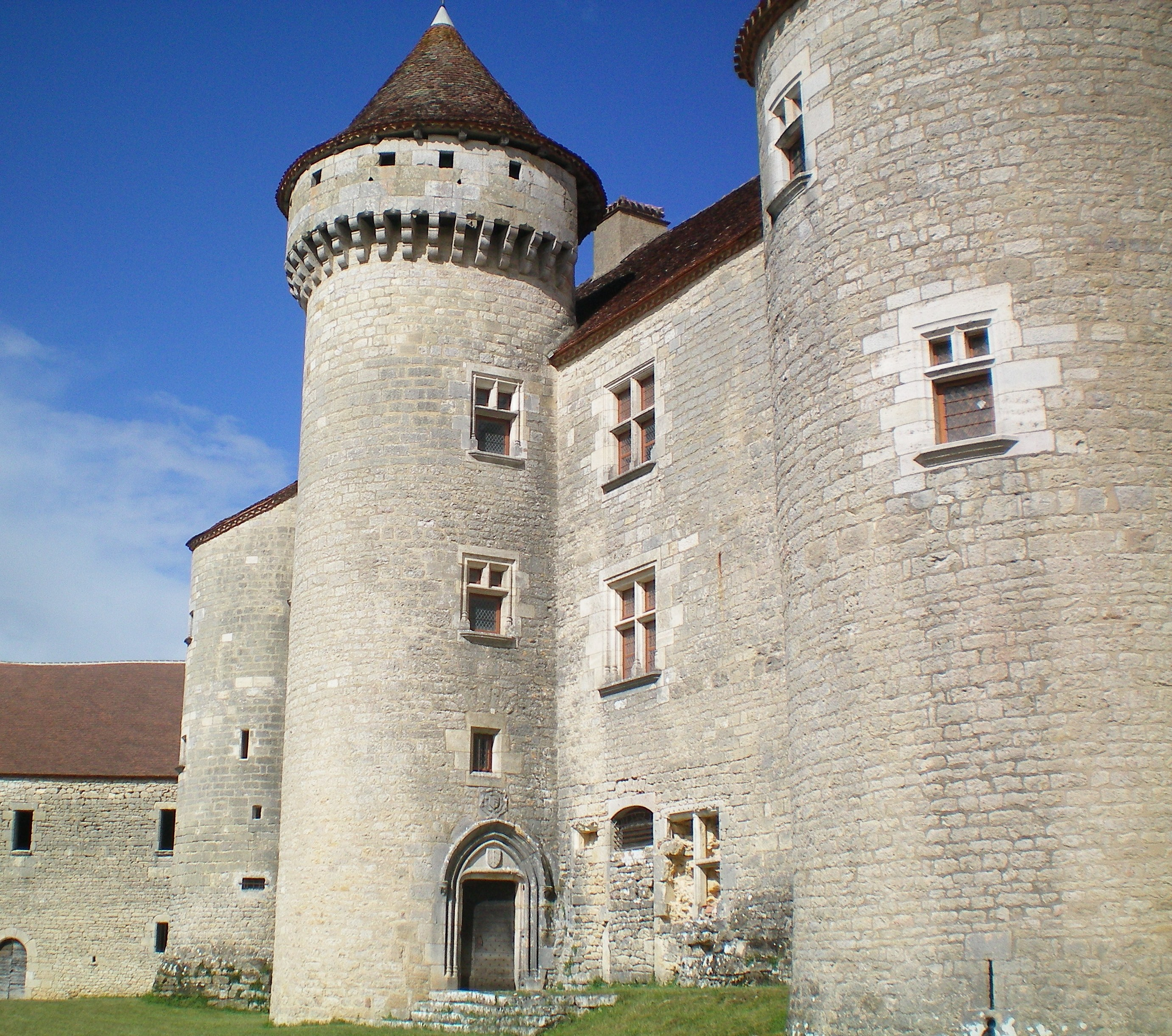 Château de Vaillac (46)